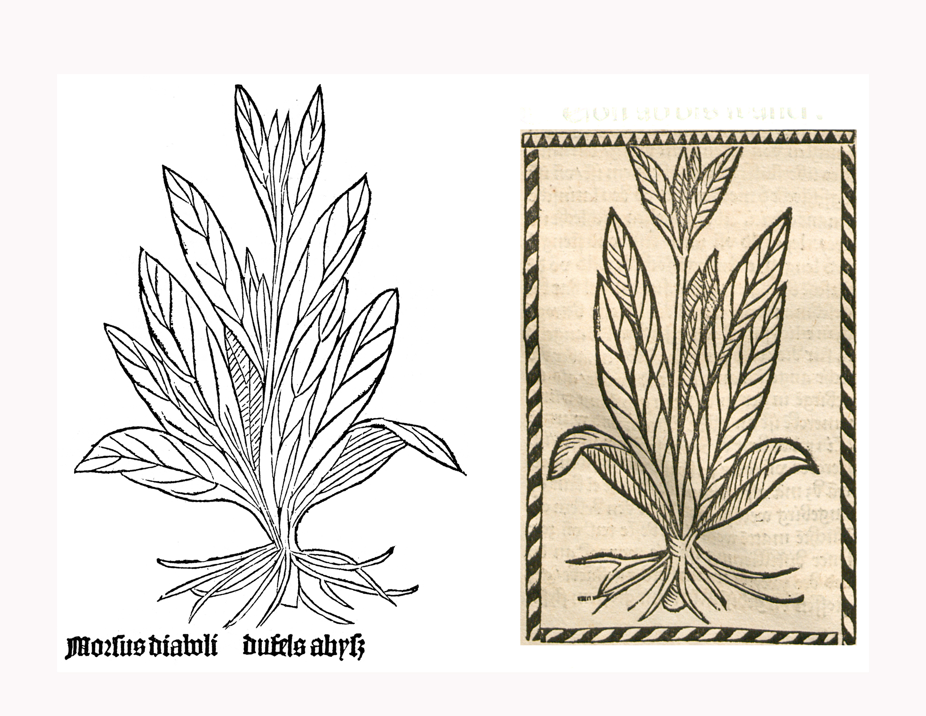 Abbildung von Abbis (Succisa pratensis)